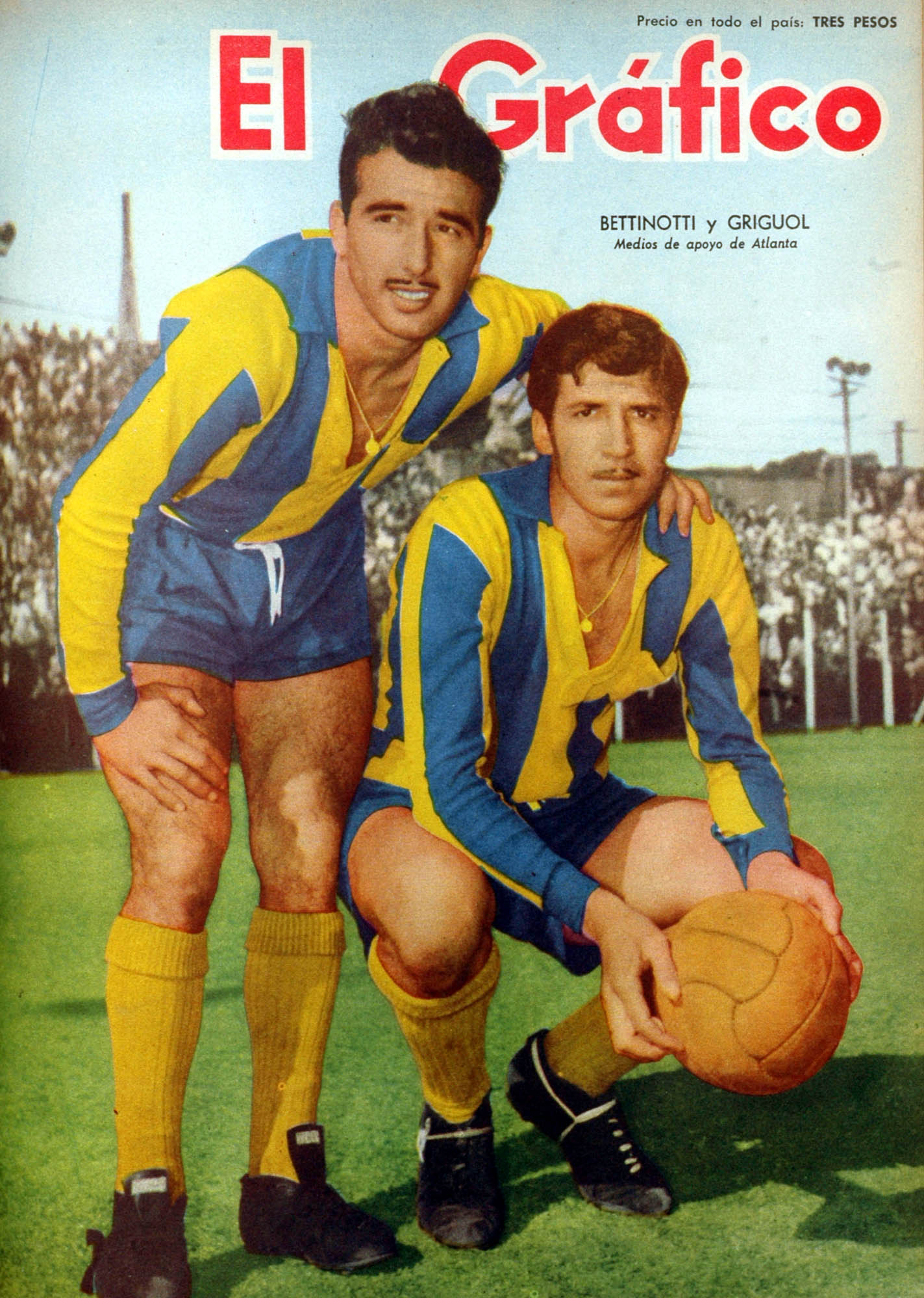 El Grafico del 16 de Mayo de 1958. Edicion 2018